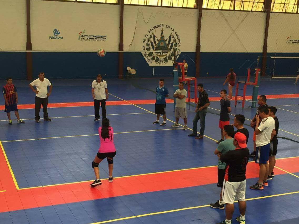 Entrenamiento de voleibol mixto en Fesavol